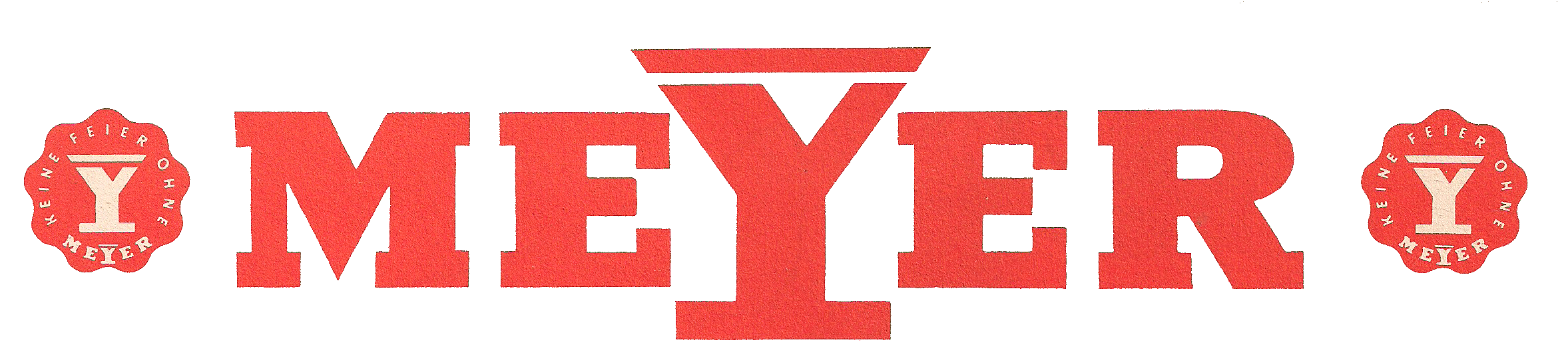 Historisches Logo der Firma Hermann Meyer & Co KG aus den 1960er-Jahren